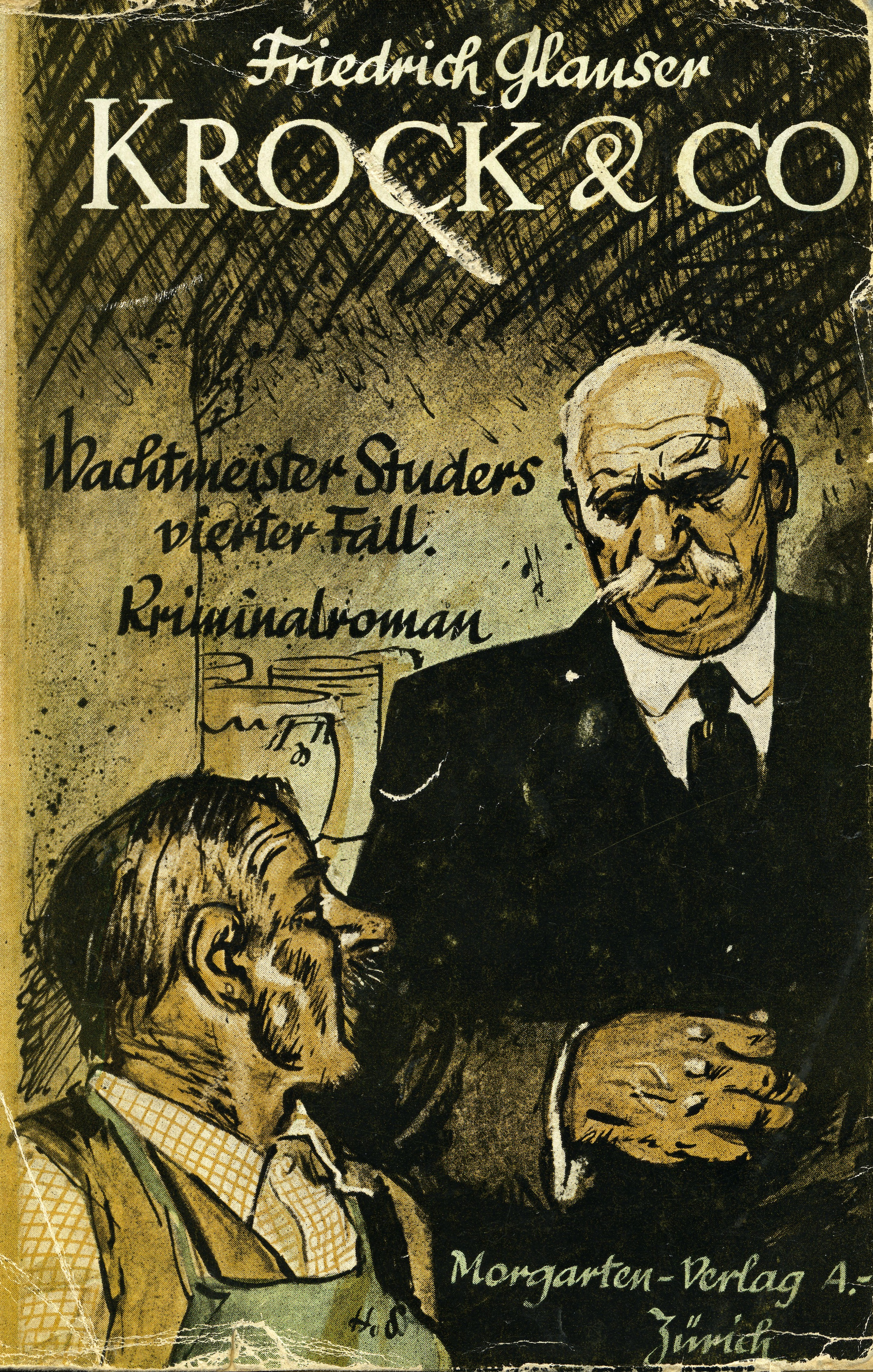 „Krock & Co.“ („Die Speiche“) in der Buchausgabe des Morgarten-Verlags, Zürich 1941. Verlag wurde übernommen vom Oesch Verlag, Zürich. Umschlagentwurf: H. Schaad